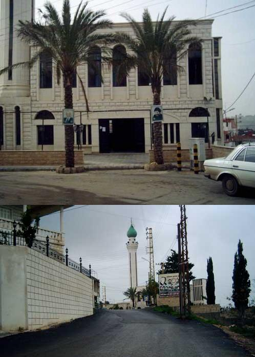 الجامع والحسينية - بلدة عبا جنوب لبنان